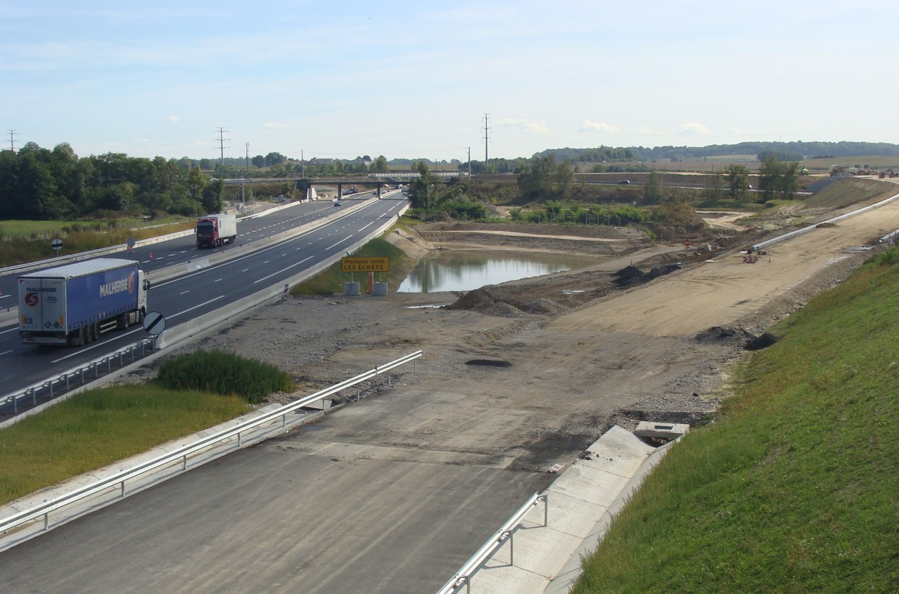 Construction de l'embranchement de l'A432 sur l'A46 aux Échets ; vue prise en direction du sud en octobre 2010. On aperçoit à l'arrière-plan le viaduc de la LGV (parapets blancs).